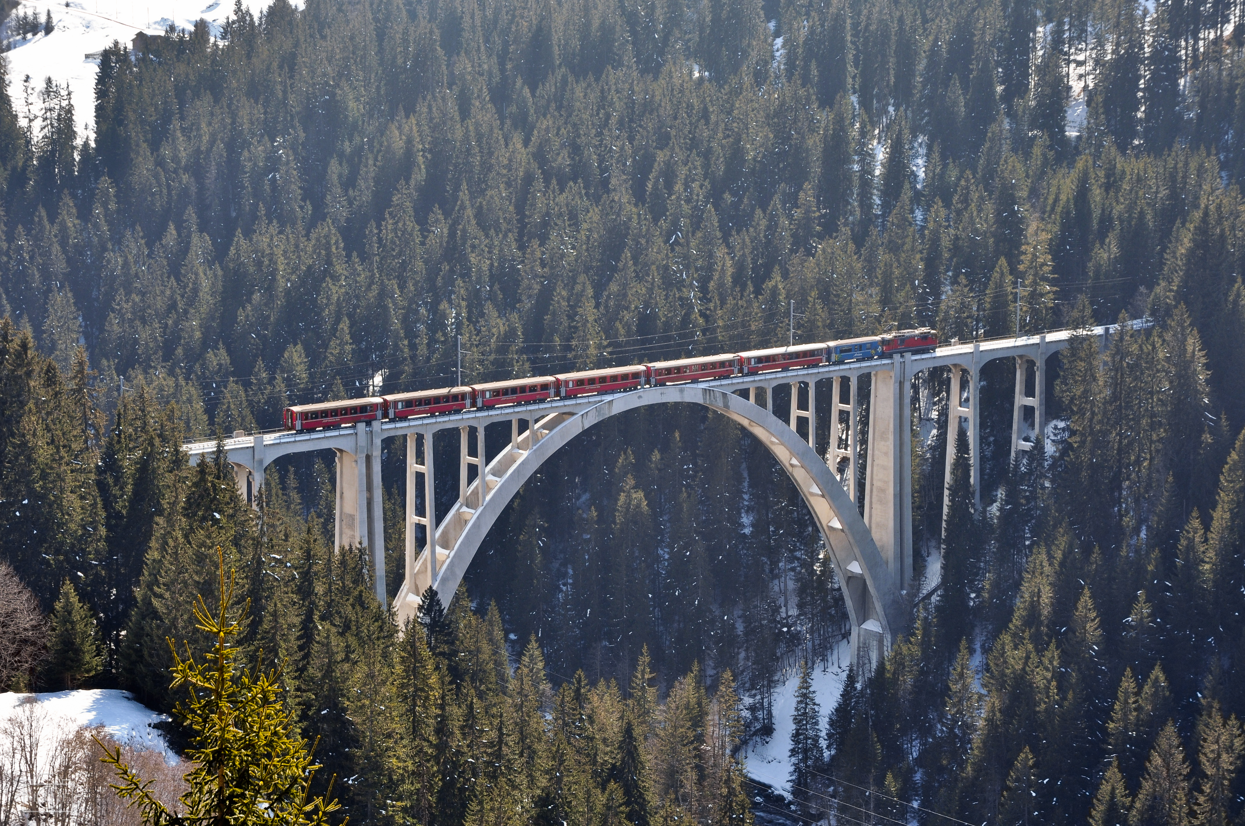 Langwieser Viadukt 2011 mit einem Zug der RhB